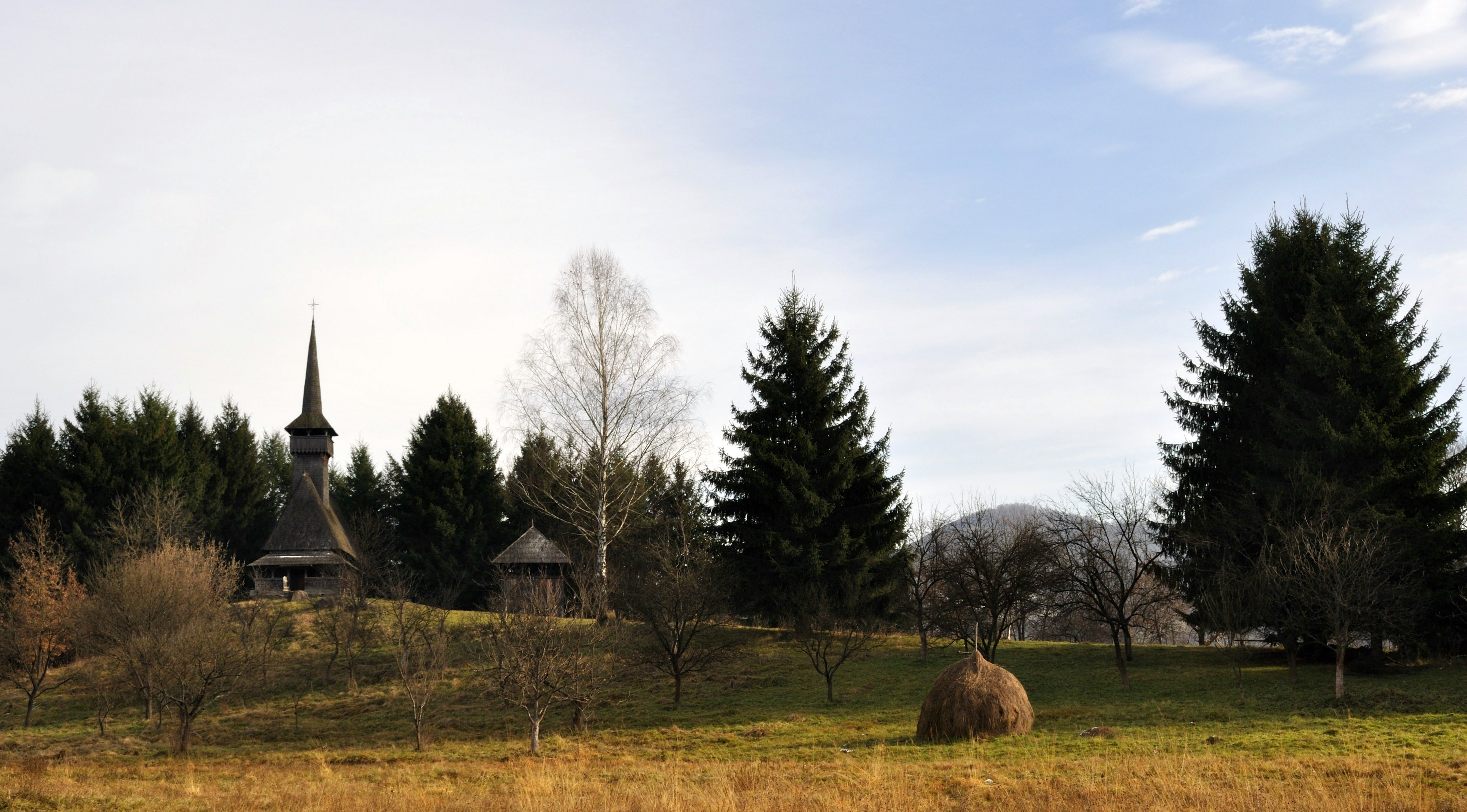 Ansamblu de arhitectură şi tehnică populară, "Dealul Doboieş", municipiul SIGHETU MARMAŢIEI